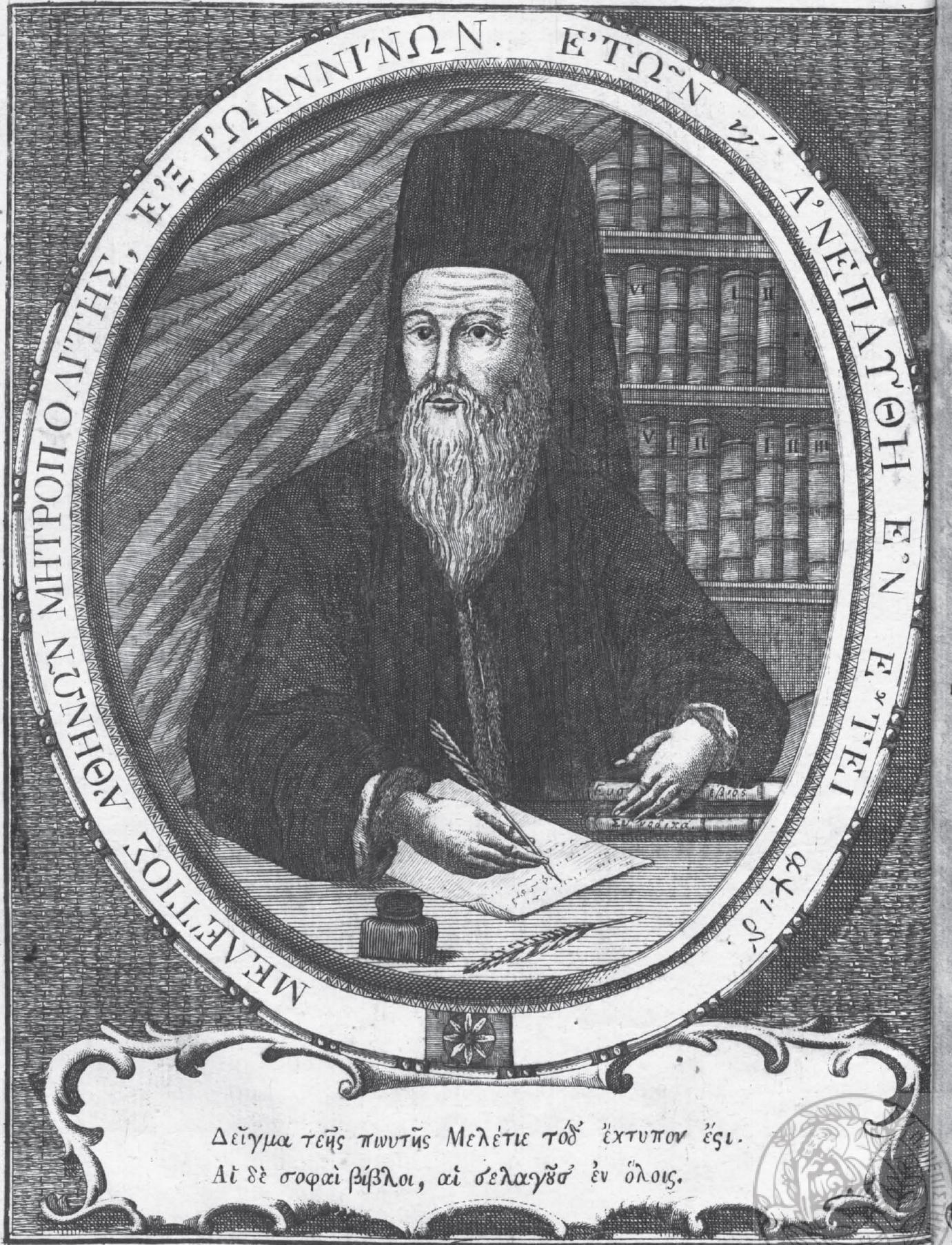 Μελέτιος Μητροπολίτης Αθηνών